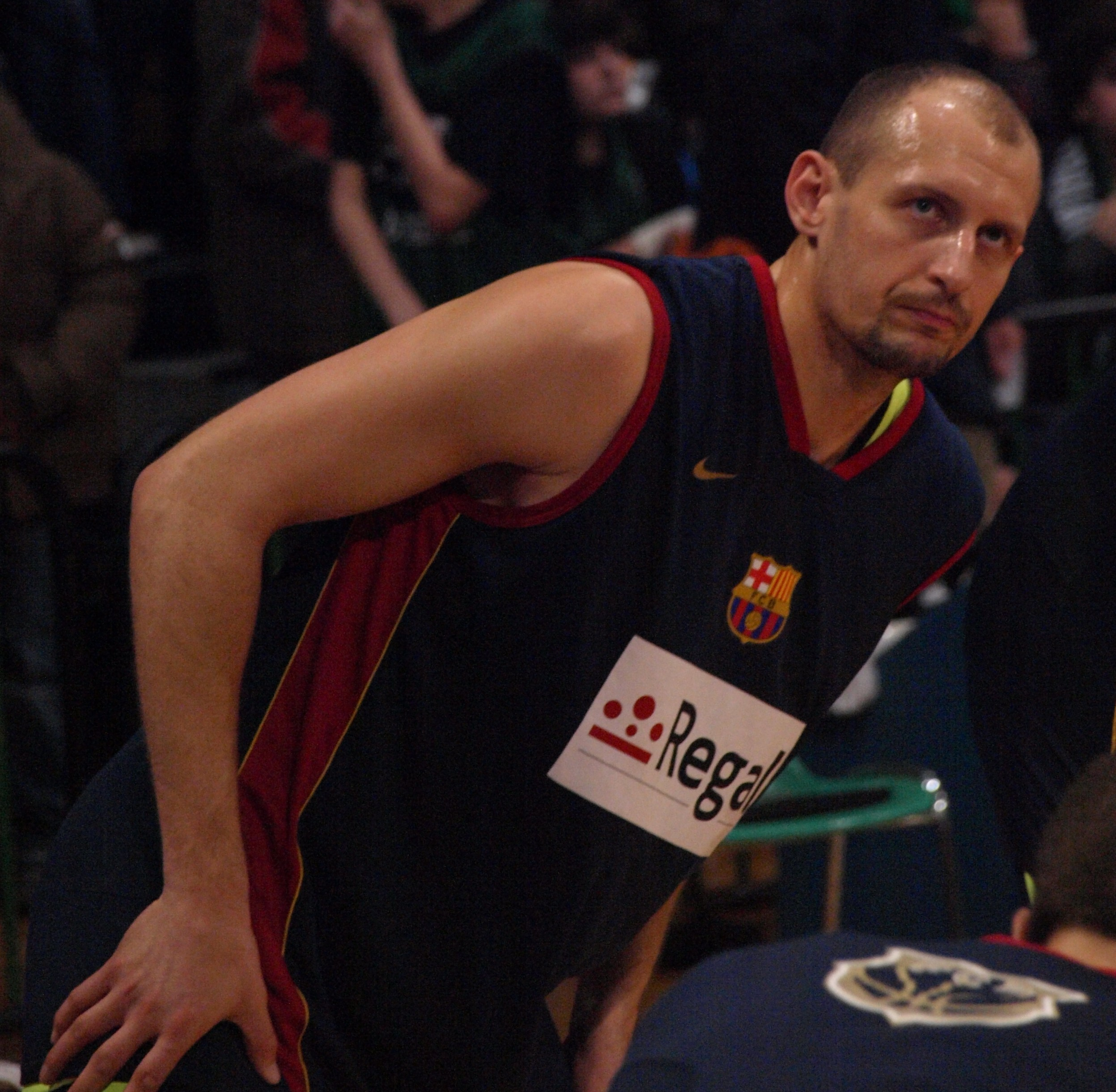 Lubos Barton, en el partido que enfrentó al FC Barcelona y al DKV Joventut de liga ACB en el Olímpico de Badalona en enero de 2009